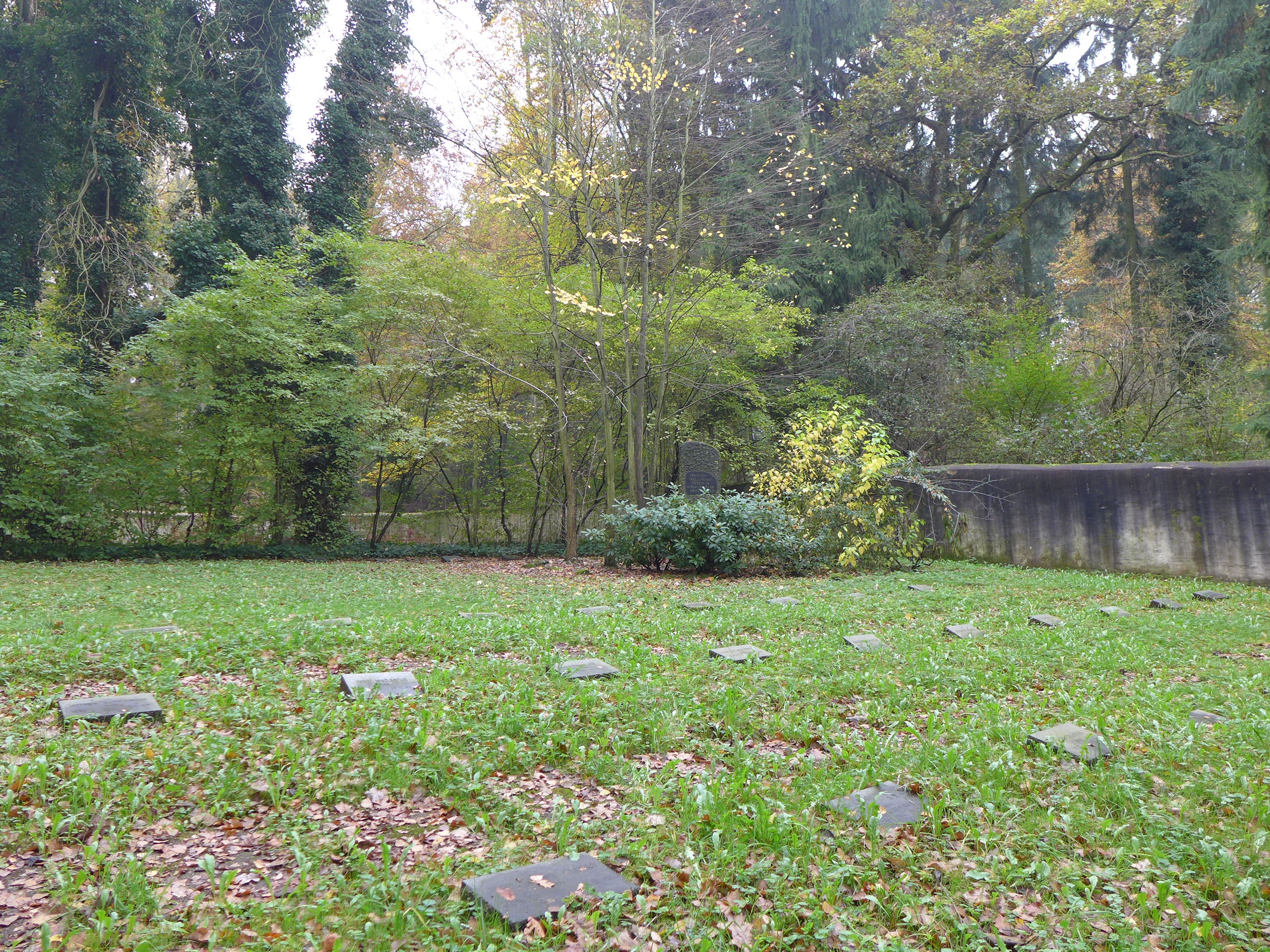 Diefflen, Jüdischer Friedhof